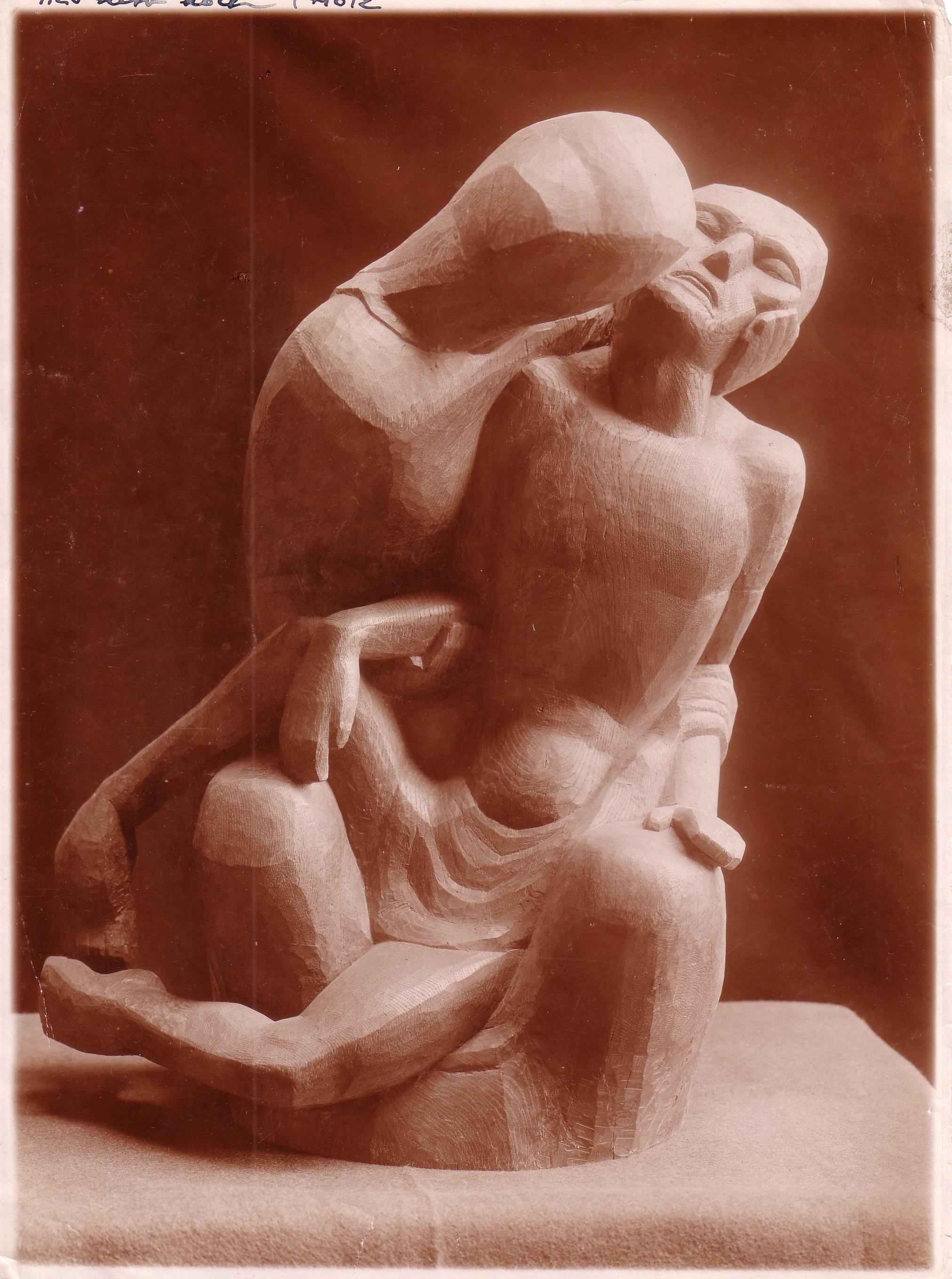 Pietà (Eichenholz) von Philipp Harth (1922)